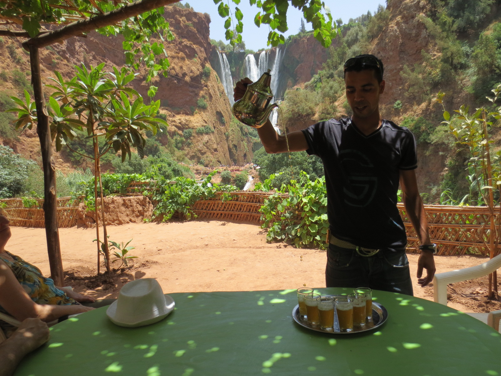 Ouzoud Falls